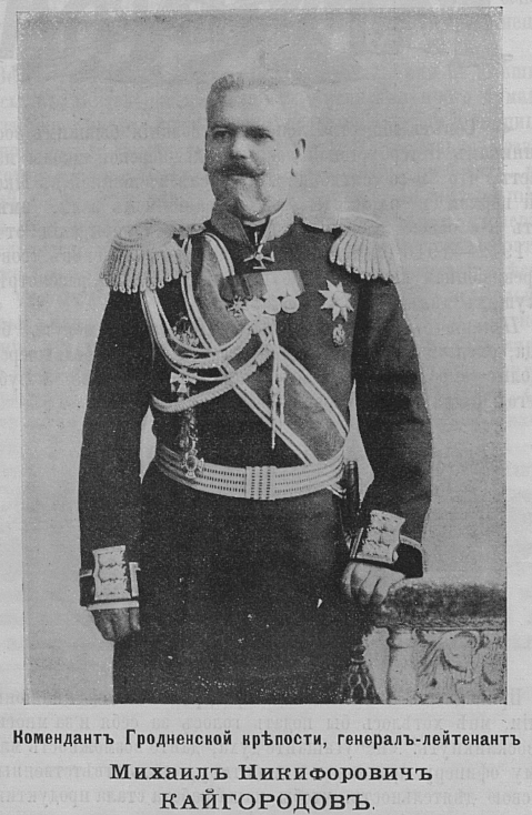 Михаил Никифорович Кайгородов (25 октября 1853 — октябрь 1918) — генерал от инфантерии, иркутский губернатор, комендант Гродненской крепости.